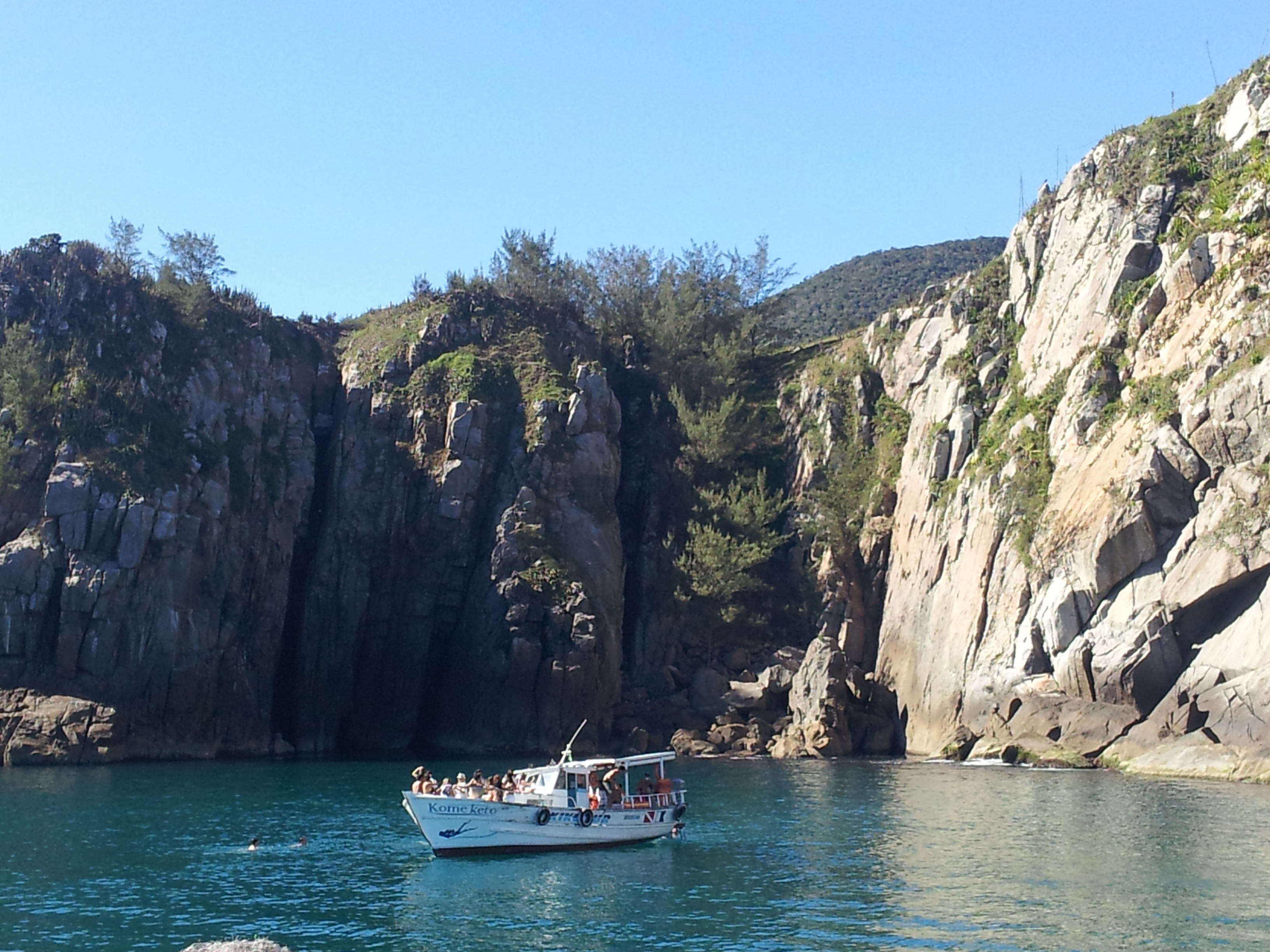 Paredão rochosos que encanta quem por ali passa.